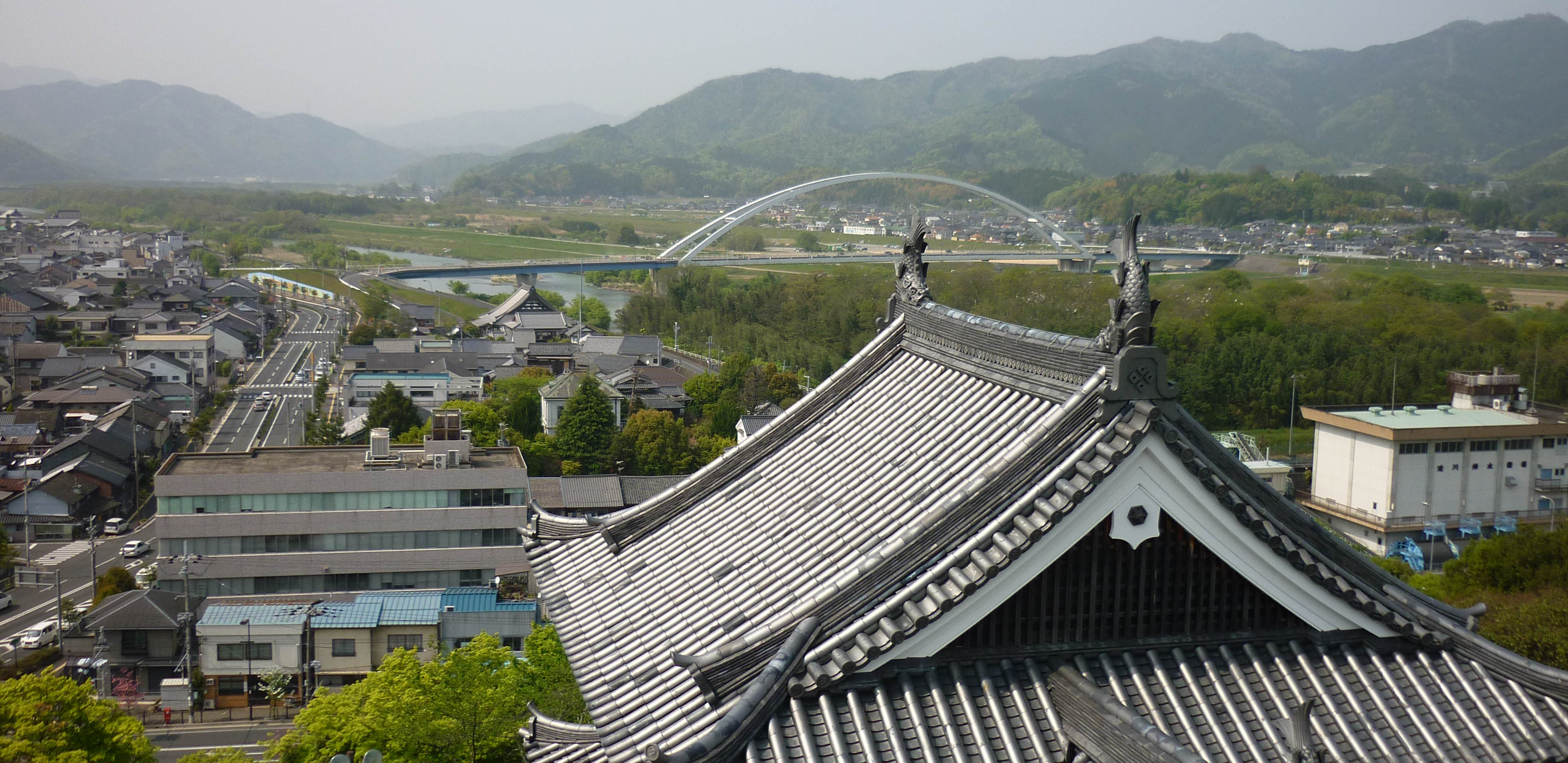 天守からの眺望